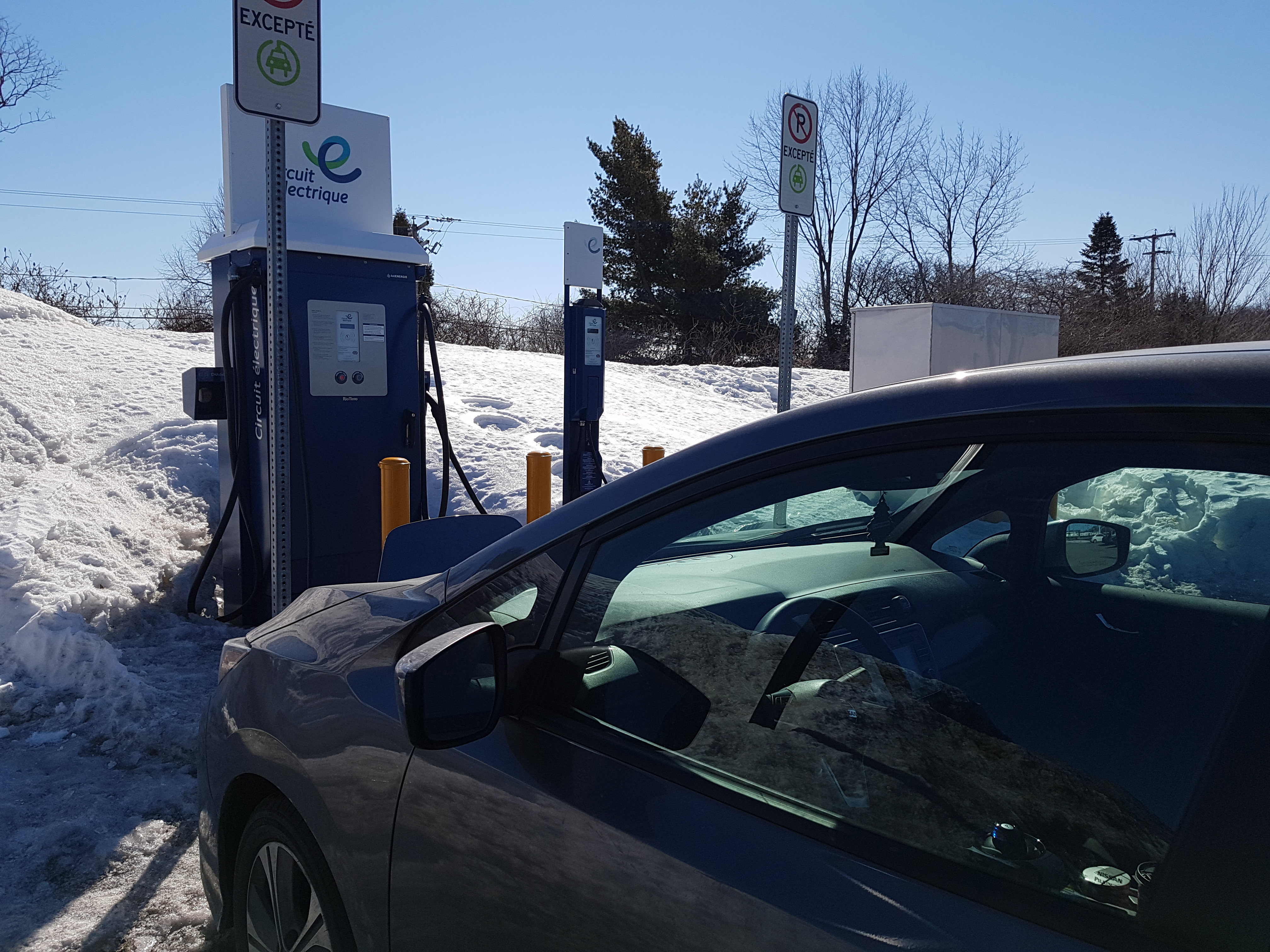 Une Nissan LEAF 2019 effectuant une recharge sur une borne de recharge à courant continu du Circuit électrique d'Hydro-Québec à Trois-Rivières, Québec.